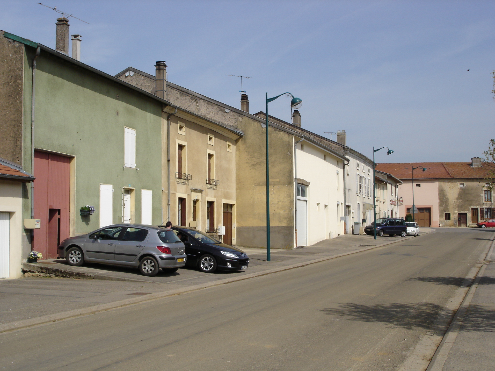 Le centre du village à Rosières-en-Haye -- Photo amateur prise par moi-même